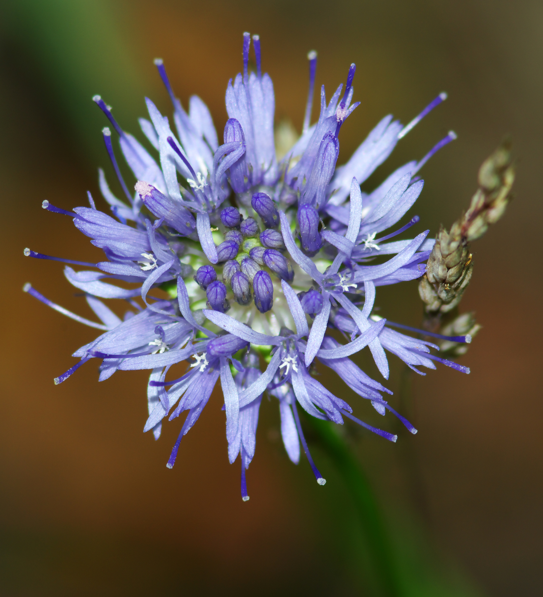 Jasieniec piaskowy (Jasione montana)